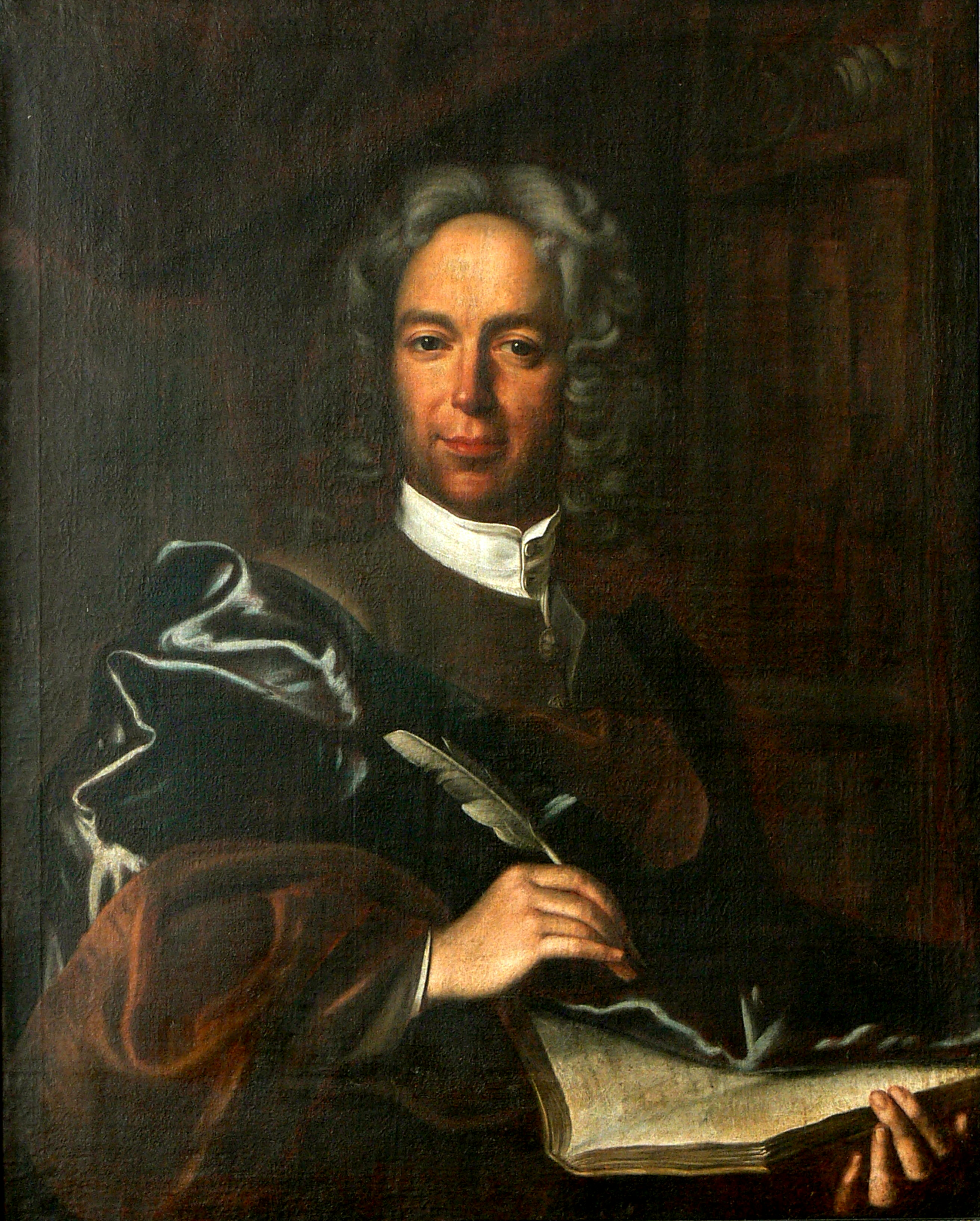 Bél Mátyás magyar és szlovák származású evangélikus lelkész, történet- és földrajztudós, író.